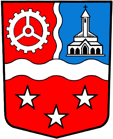 Wappen von Chippis Kanton Wallis SCHWEIZ